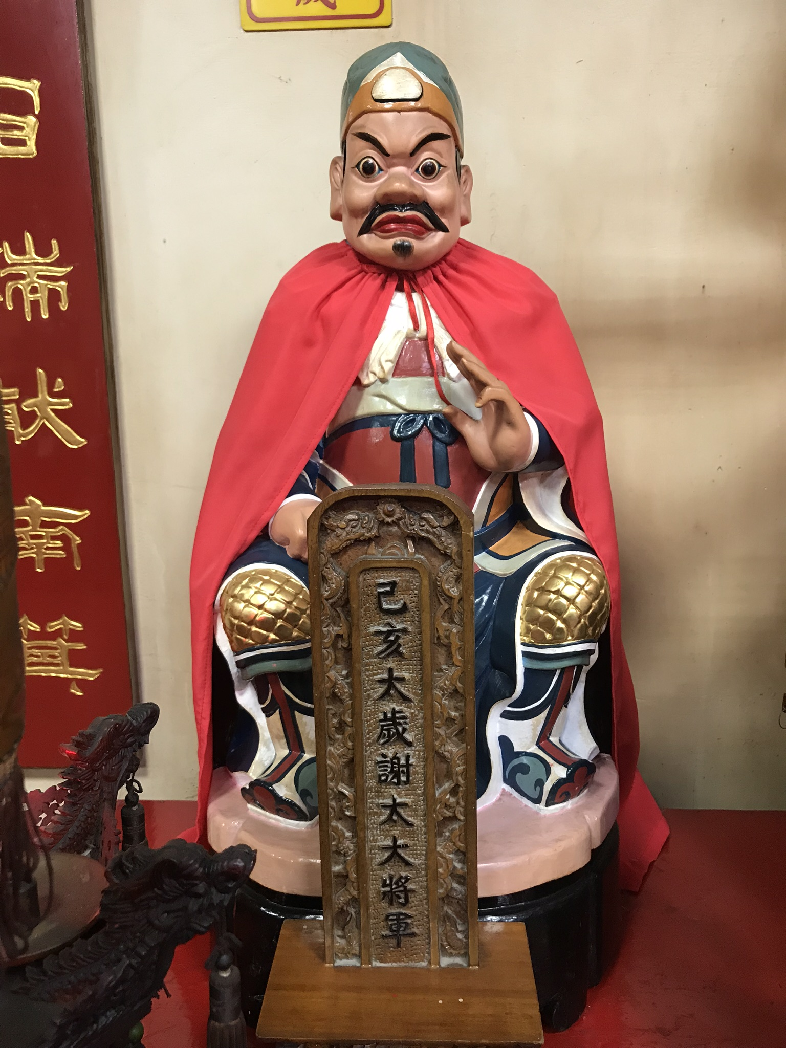 己亥太歲謝太大將軍神像